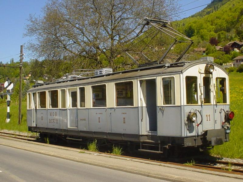 Historisches Motorwagen BCFe 4/4 11 der Montreux–Berner Oberland-Bahn (MOB) bei der Museumsbahn Blonay–Chamby in Blonay, im Jahre 2003. Im Hintergrund links eine Hippsche Wendescheibe.